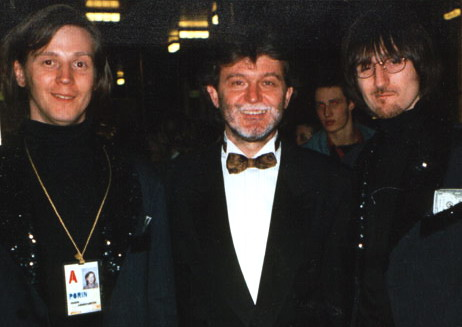 Veljko Despot i Dražen Vrdoljak, 1997.